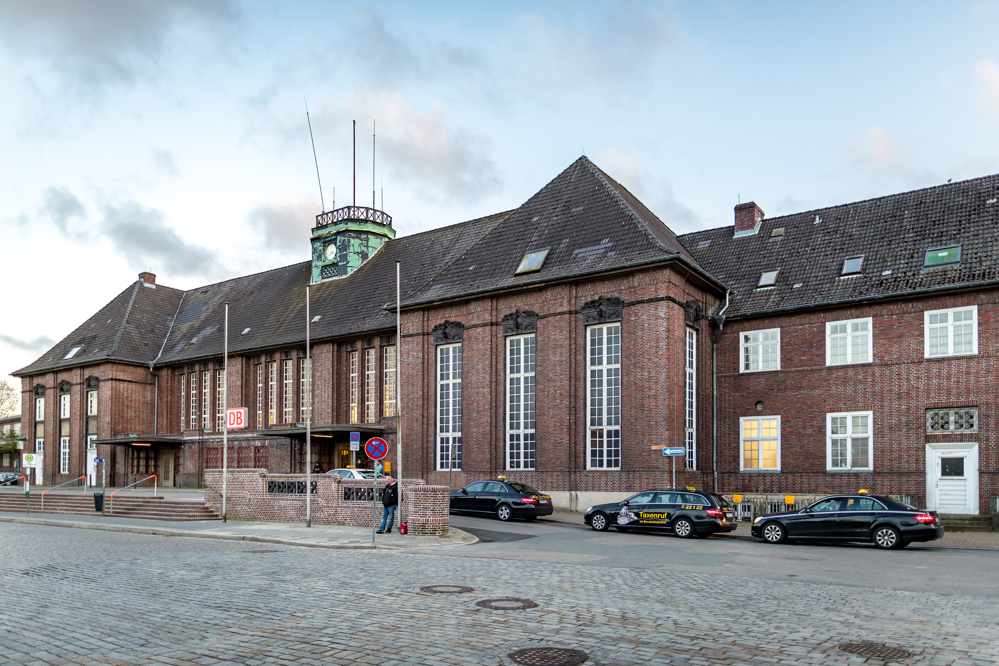 Der Bahnhof Flensburg. April 2016